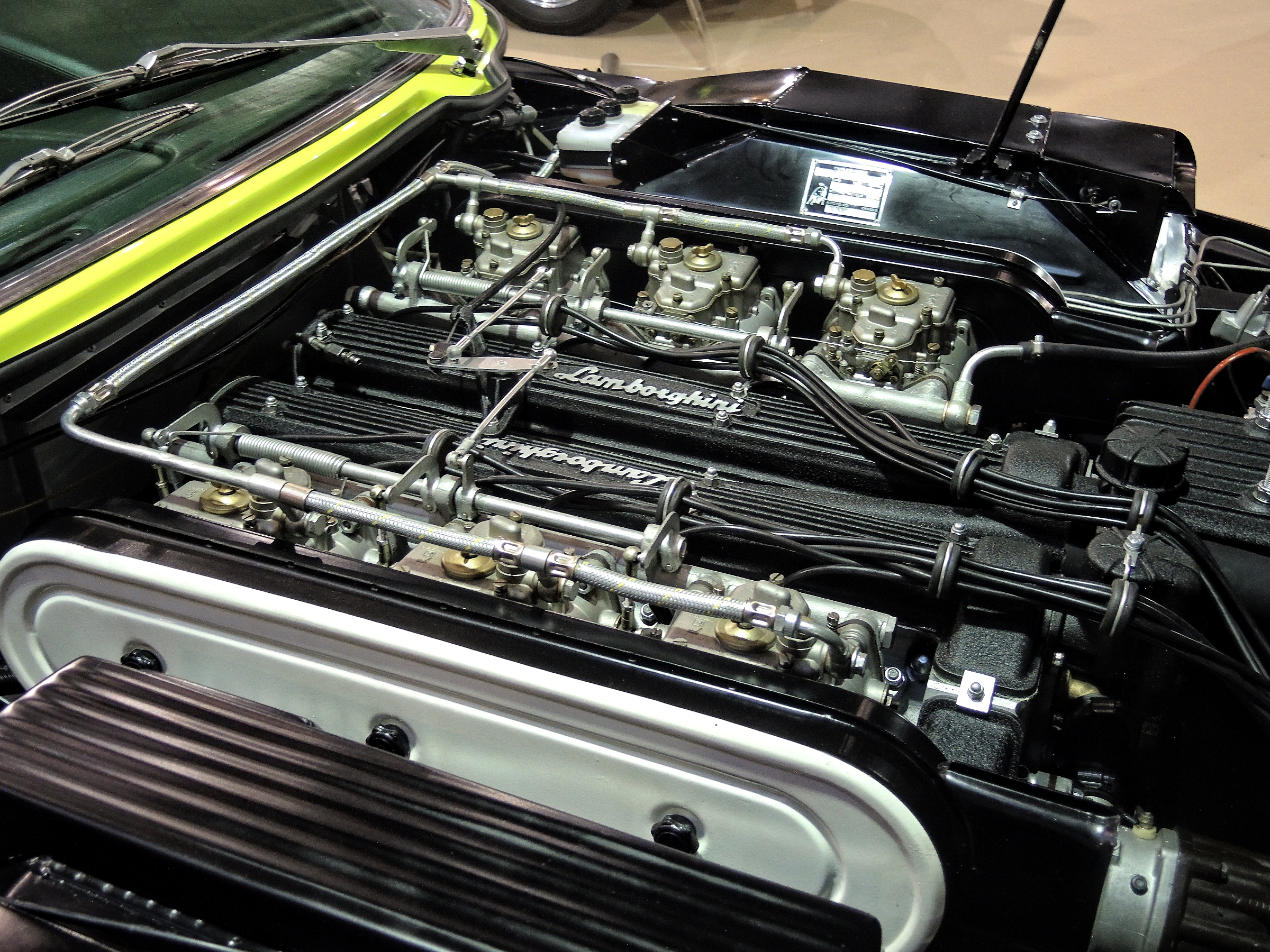 Motor de un Lamborghini Espada autoClássico Porto 2017, Portugal, octubre 2017